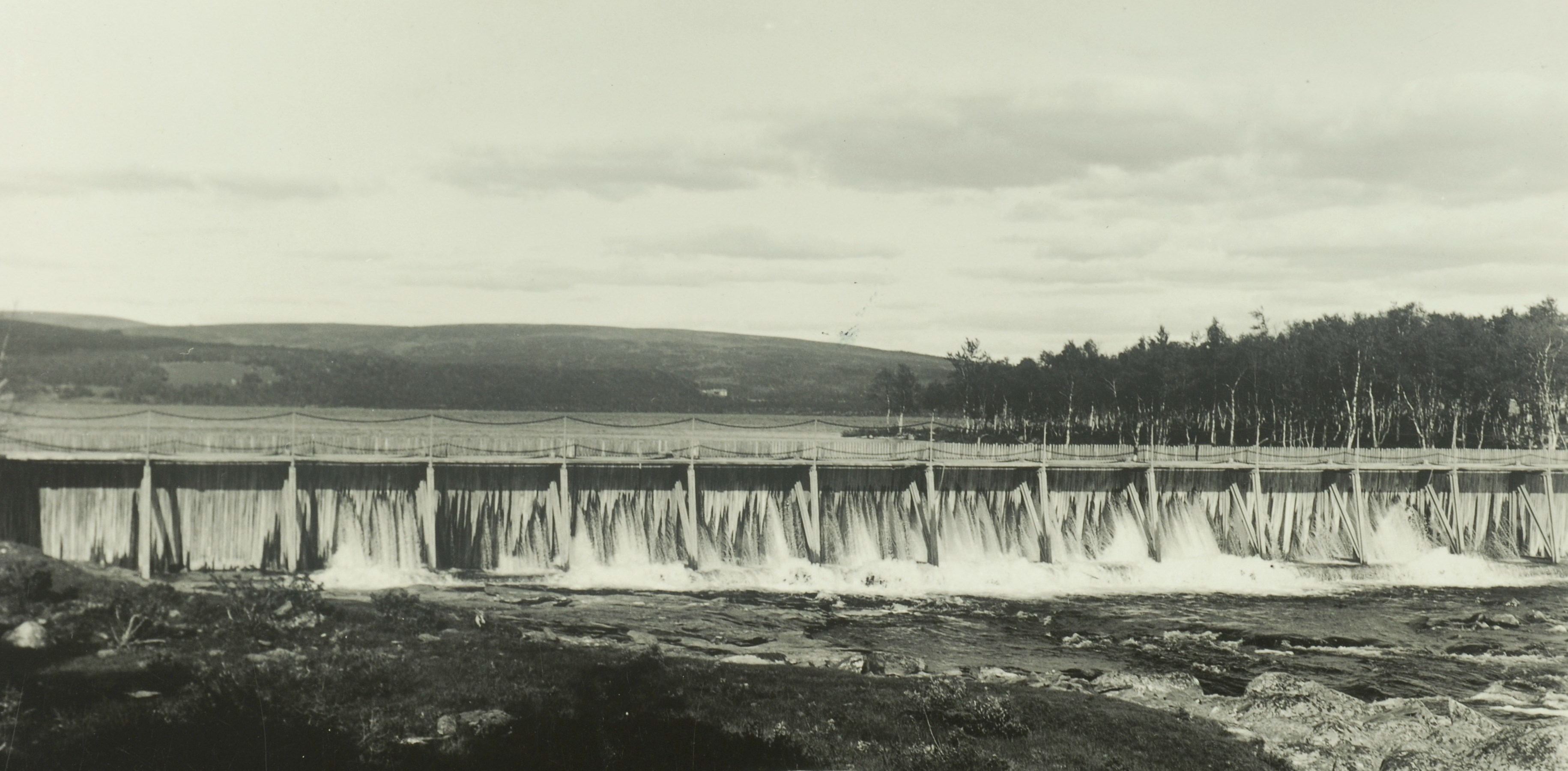 Dammen ved Aursunden. Foto: E. L. Rønning/NTNU UB. ID: UBT-TO-074812_01.